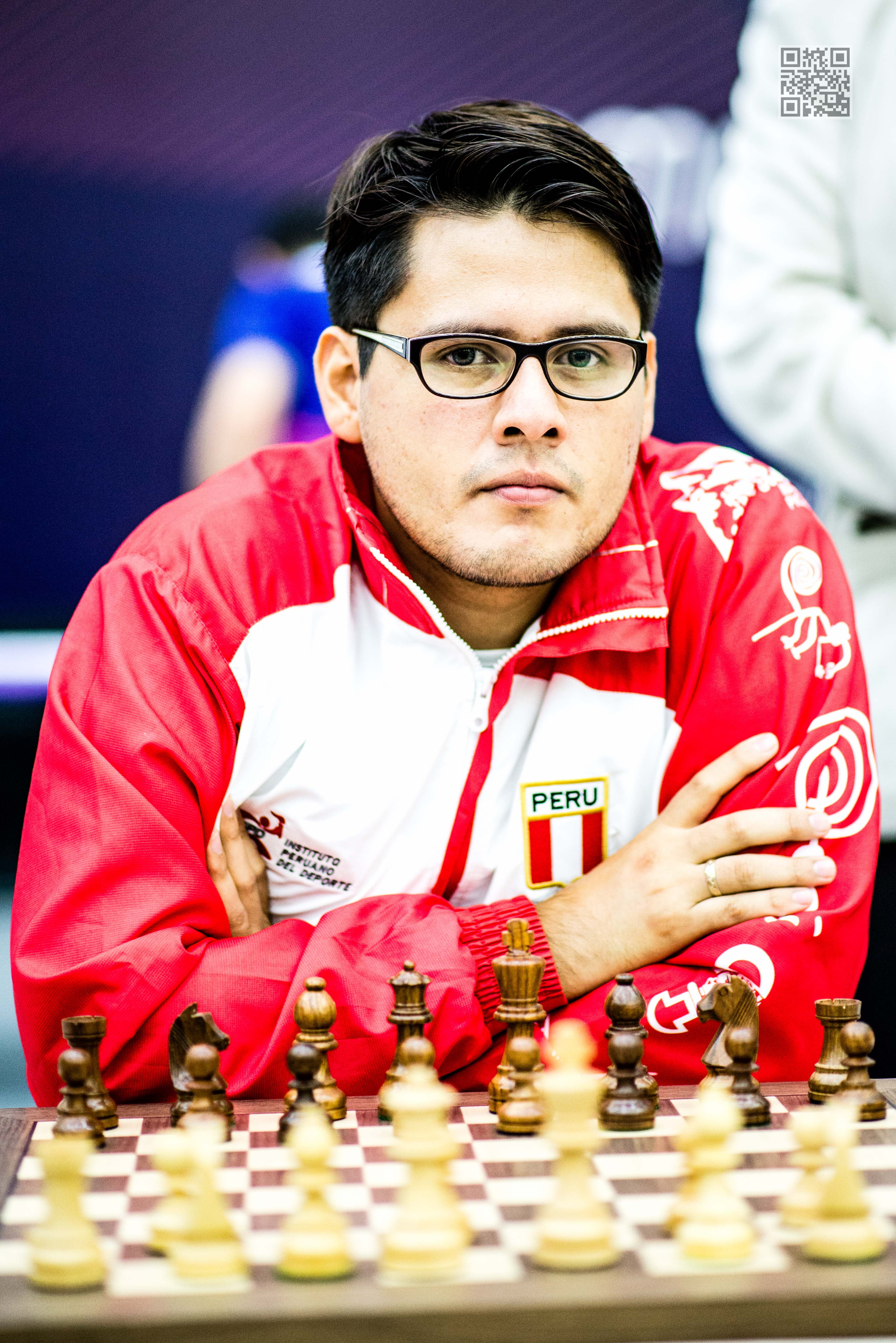 Emilio Cordova